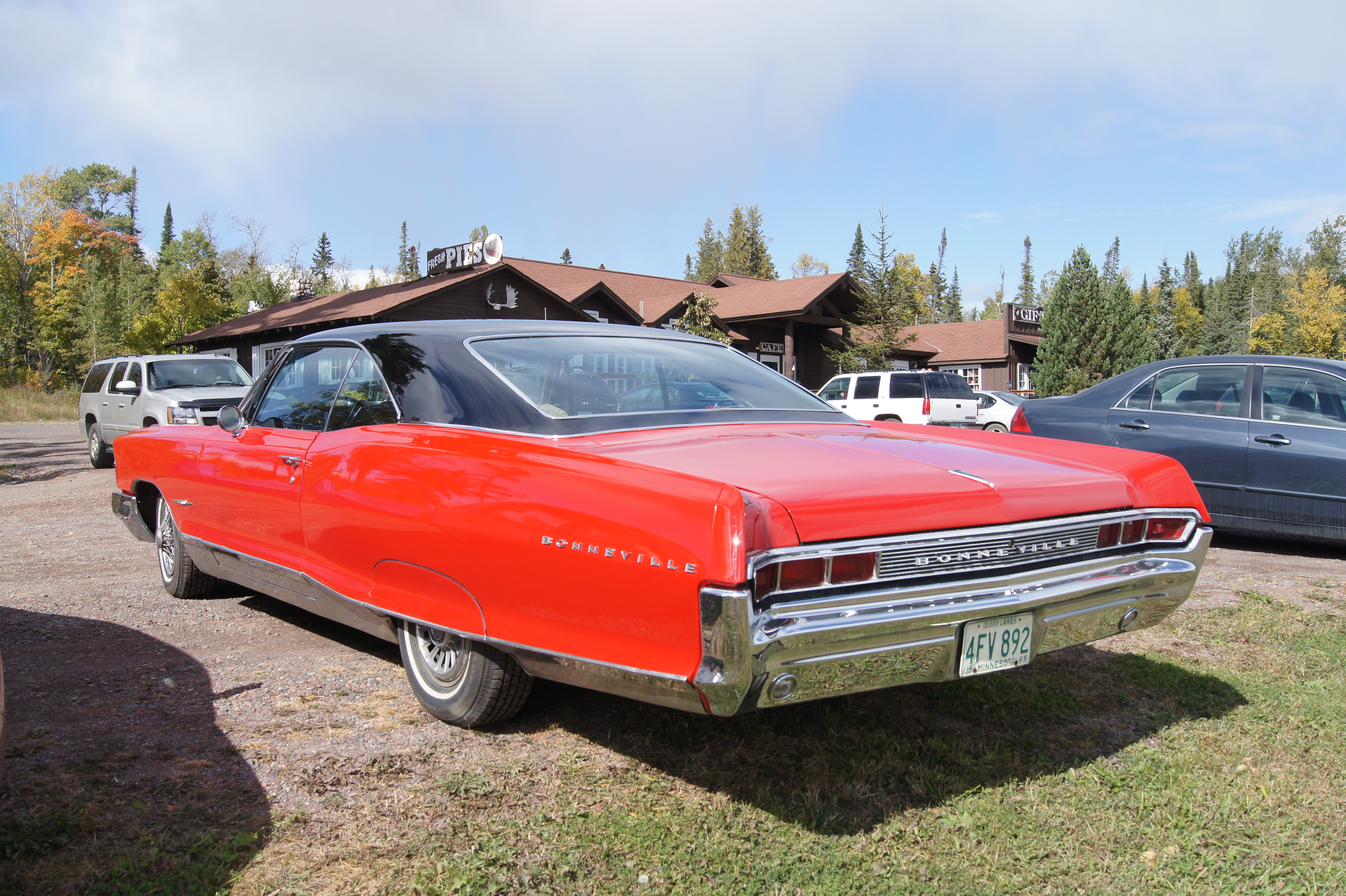 65 Pontiac Bonneville